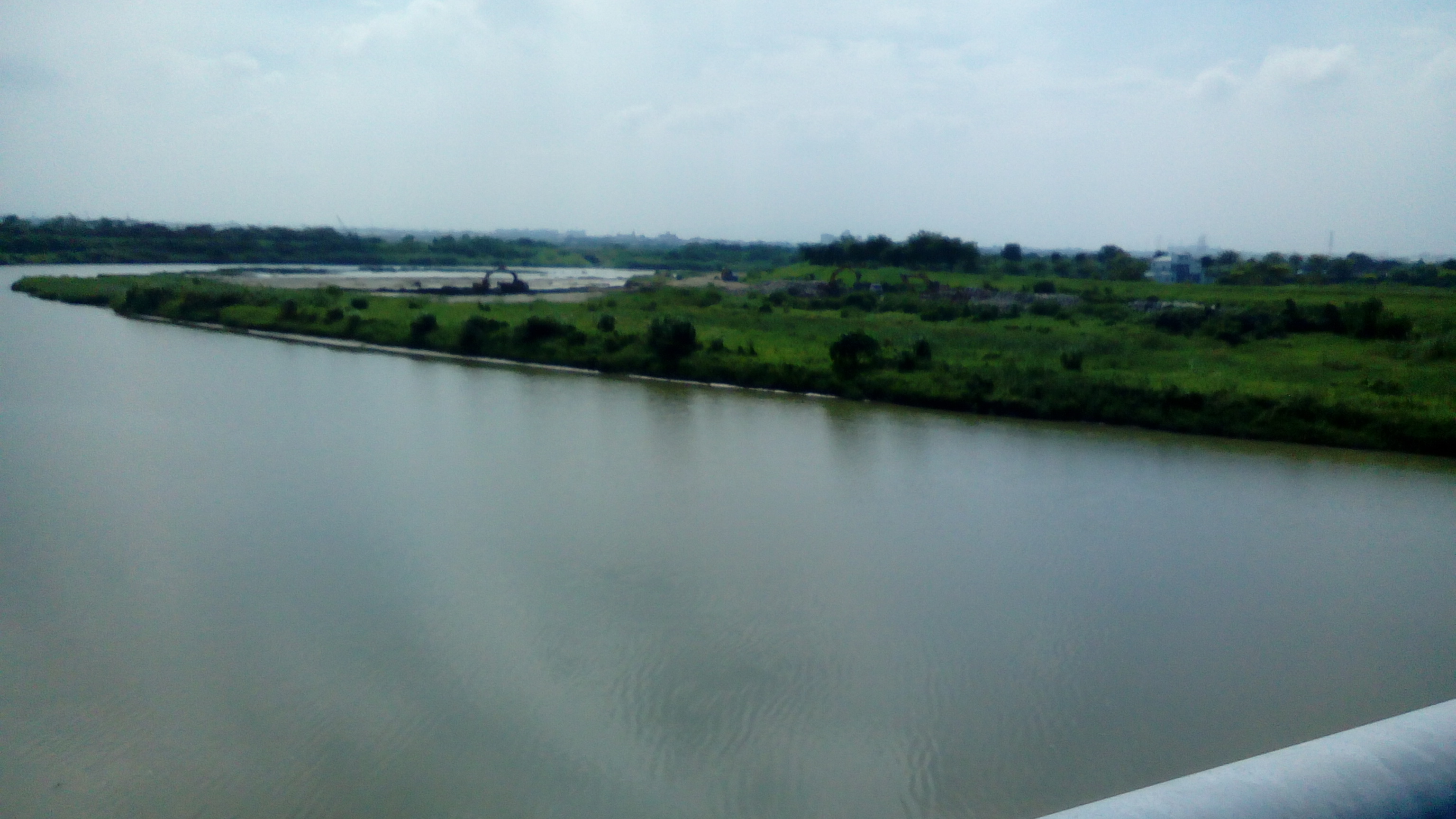 344K 二層行橋